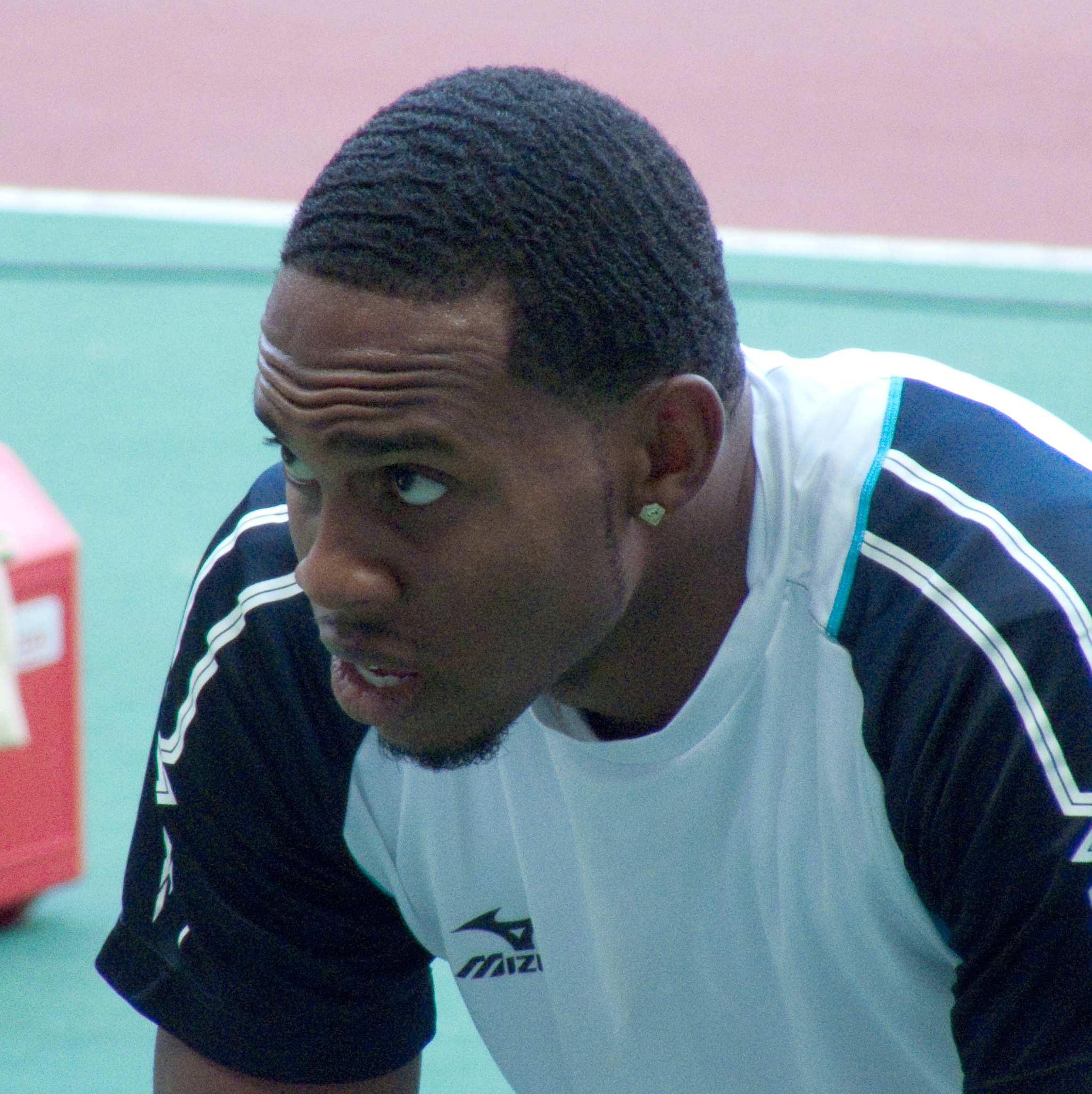 Leevan Sands lors du Meeting Areva 2009